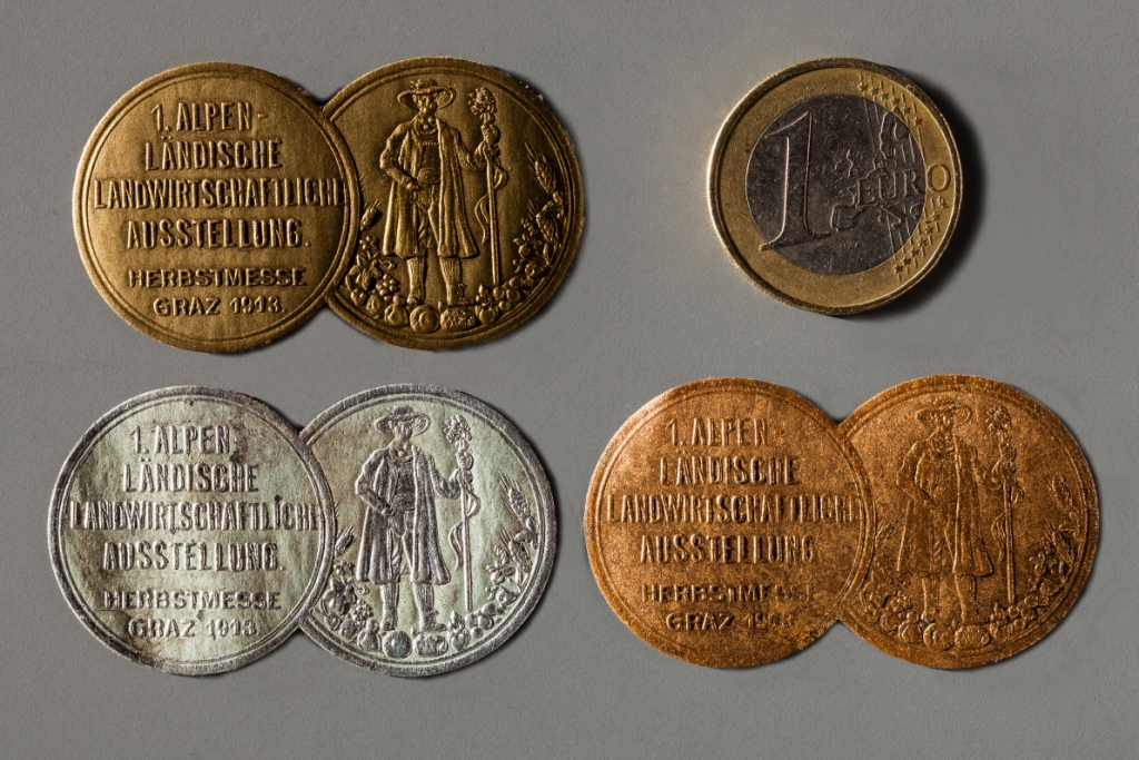 Die Abbildung zeigt sogenannte Anlassmarken (hier als kleine Siegel bzw. Signets aus beidseitig mit Prägedruck versehenem Metallfolienpapier) aus Österreich, sowie zum Größenvergleich eine 1-Euro-Münze. Die Marken stellen Nachbildungen in Miniaturversion von Gold-, Silber- und Bronzemedaillen dar, mit denen bei der 1. Alpenländischen Landwirtschaftlichen Ausstellung auf der Grazer Herbstmesse 1913 ausgestellte Produkte prämiert wurden. Sie wurden ähnlich wie Reklamemarken verwendet. Die hier abgebildeten Anlassmarken stammen aus dem Nachlass des österreichisch-ungarischen Imkers Leopold Gombocz (1875–1943).